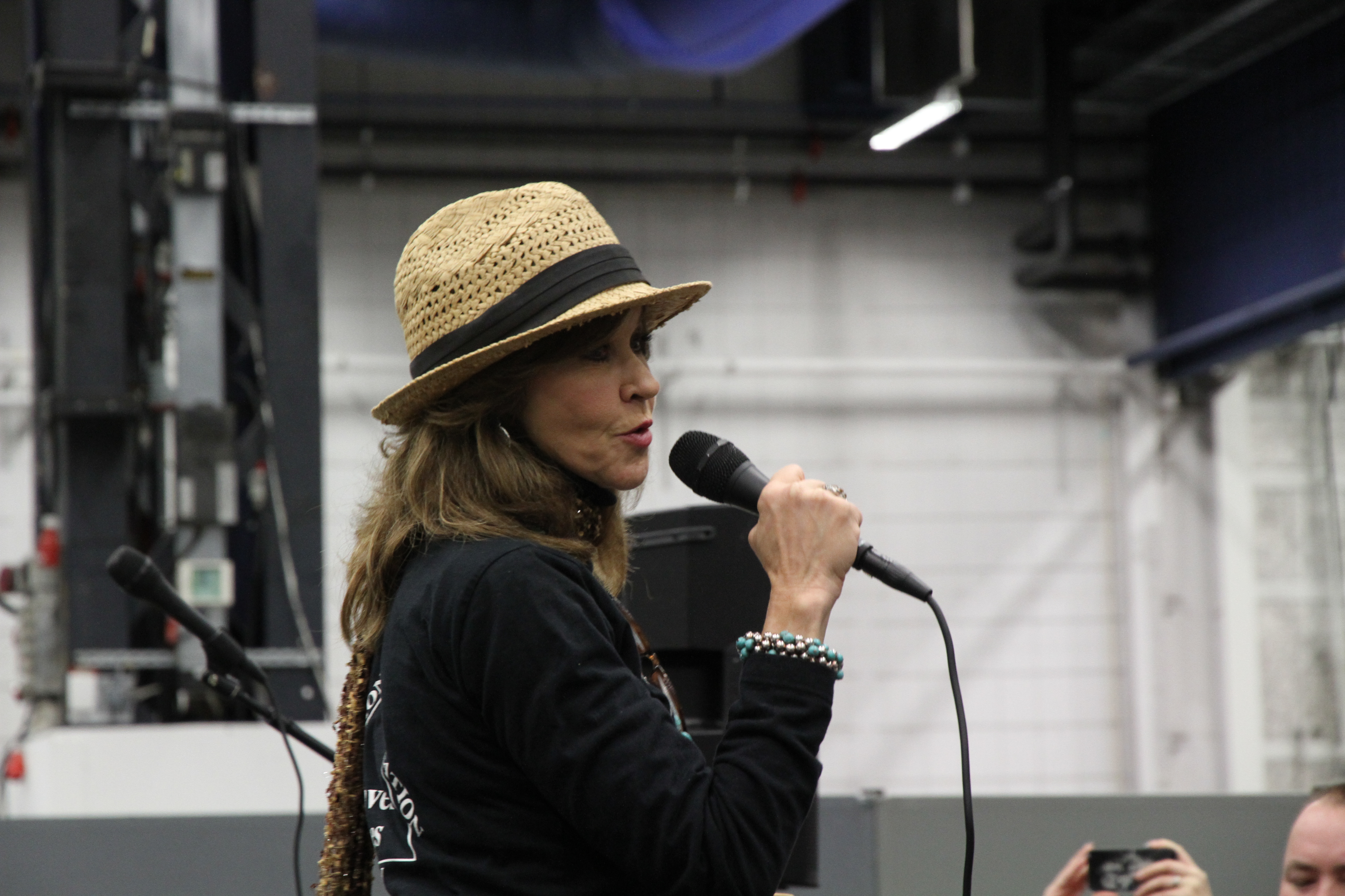 Linda Blair